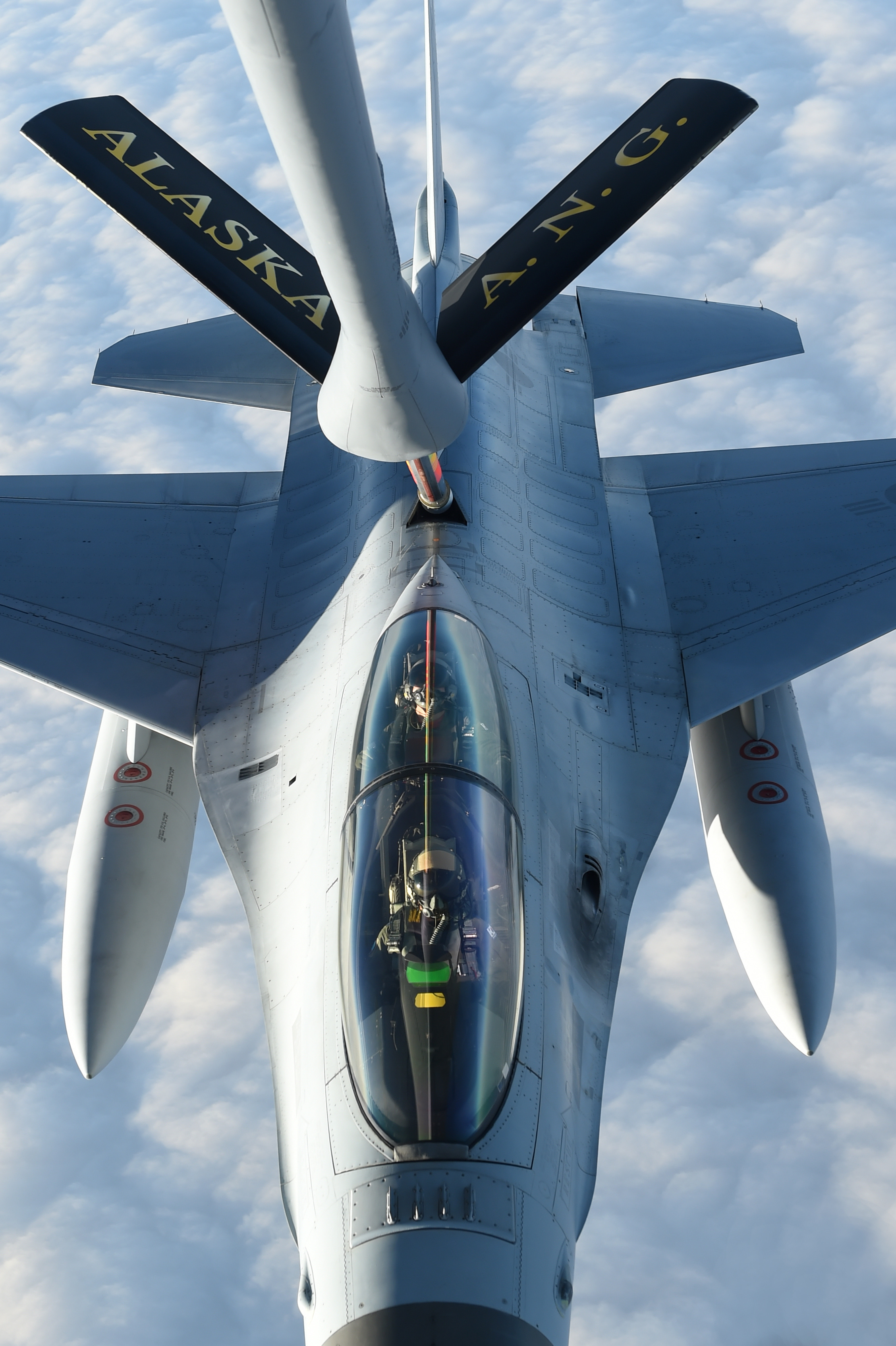 '레드플래그 알래스카' 훈련에 참가 중인 KF-16 전투기가 미공군의 KC-135 공중급유기로부터 공중급유를 받고 있다.